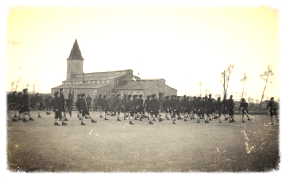 Jongens met 'Nieuwzeelander'- kostuum in de School van de koningin te Wulveringem